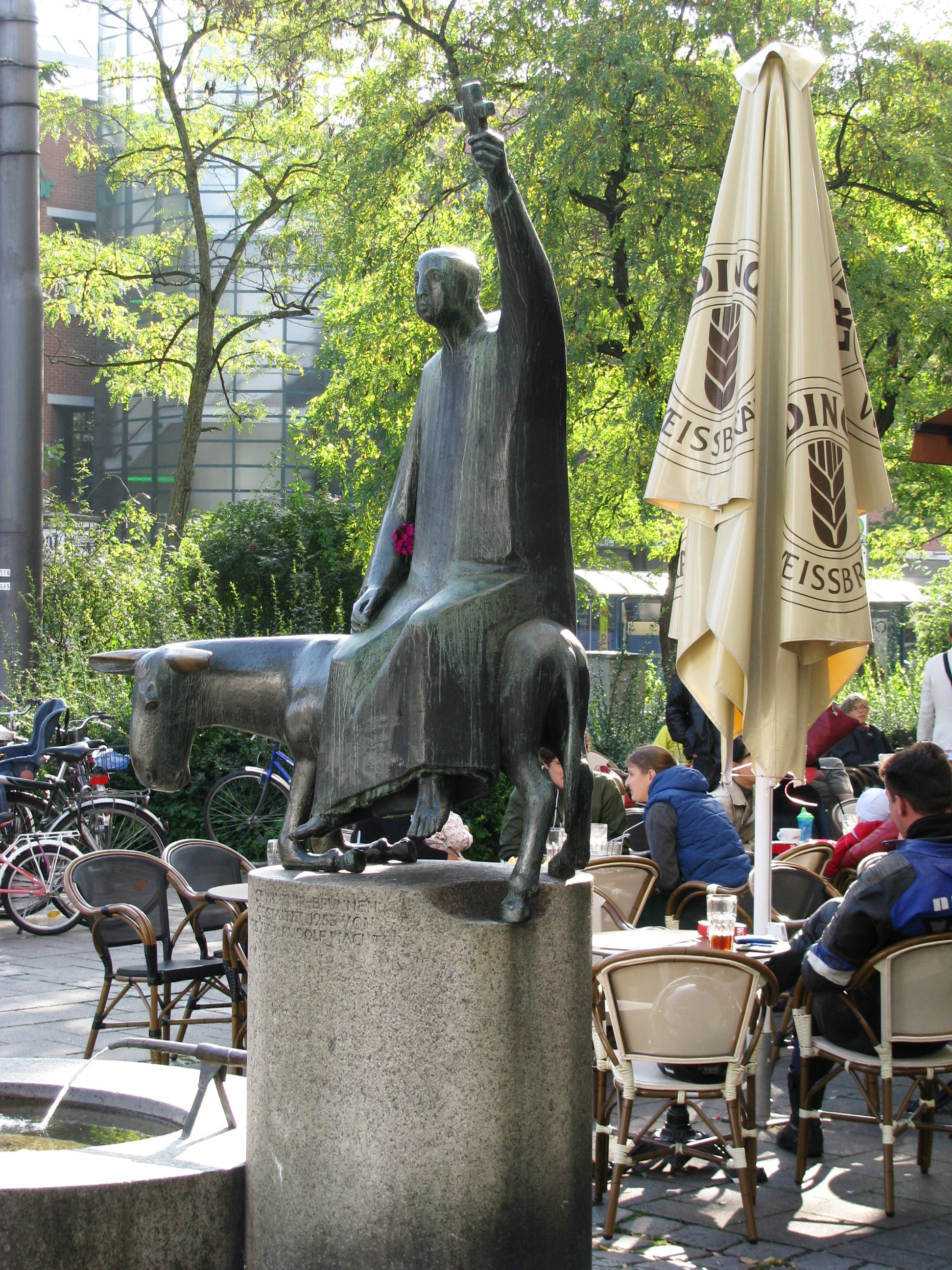 St.-Winthir-Brunnen am Rotkreuzplatz in München